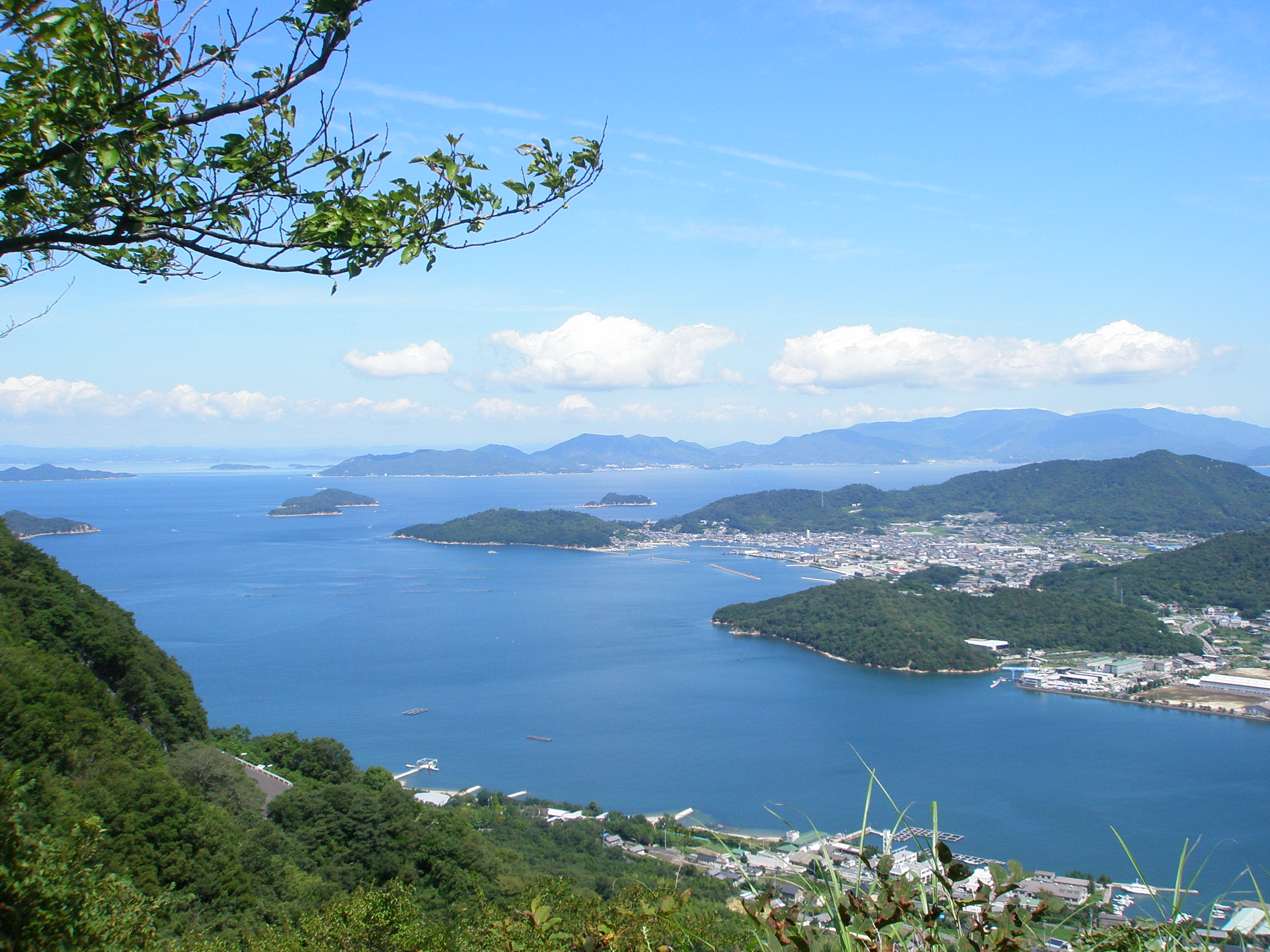 屋島古戦場跡